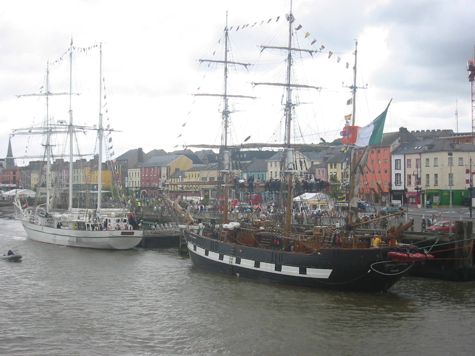 Tallship Race Waterford (IL)